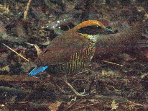 Female Pitta gurneyi, Kao Nor Chuchi, Krabi, Thailand